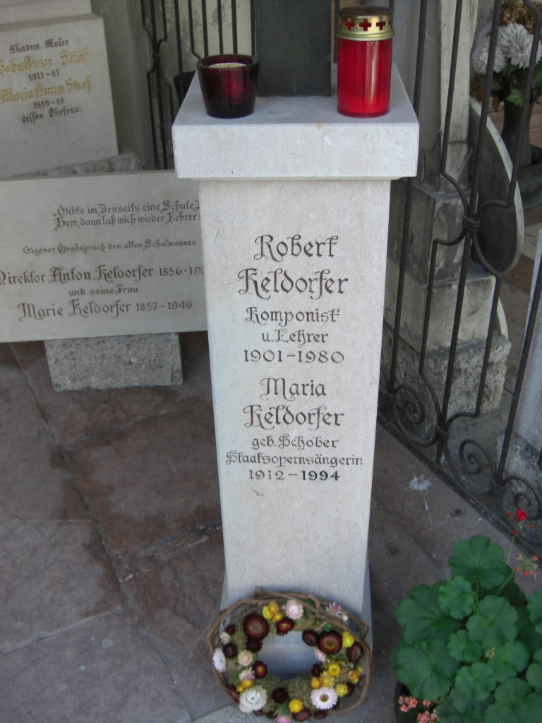 Grab des Komponisten, Pianisten und Musikdirektors Robert Keldorfer (1901-1980) und der Opernsängerin Maria Schober Keldorfer (1912-1994) auf dem Petersfriedhof in Salzburg